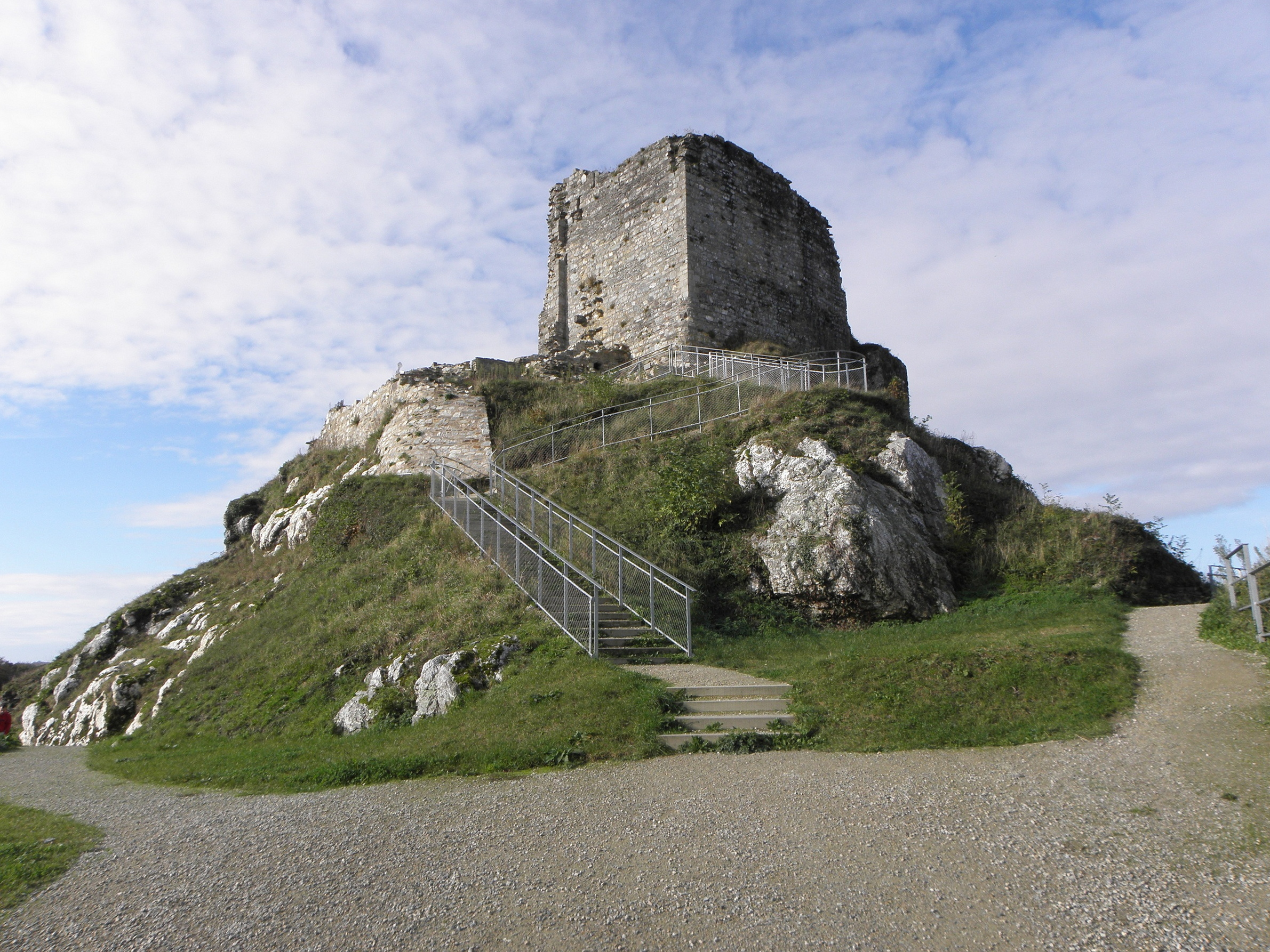 Château de La Roche-Maurice (29). .